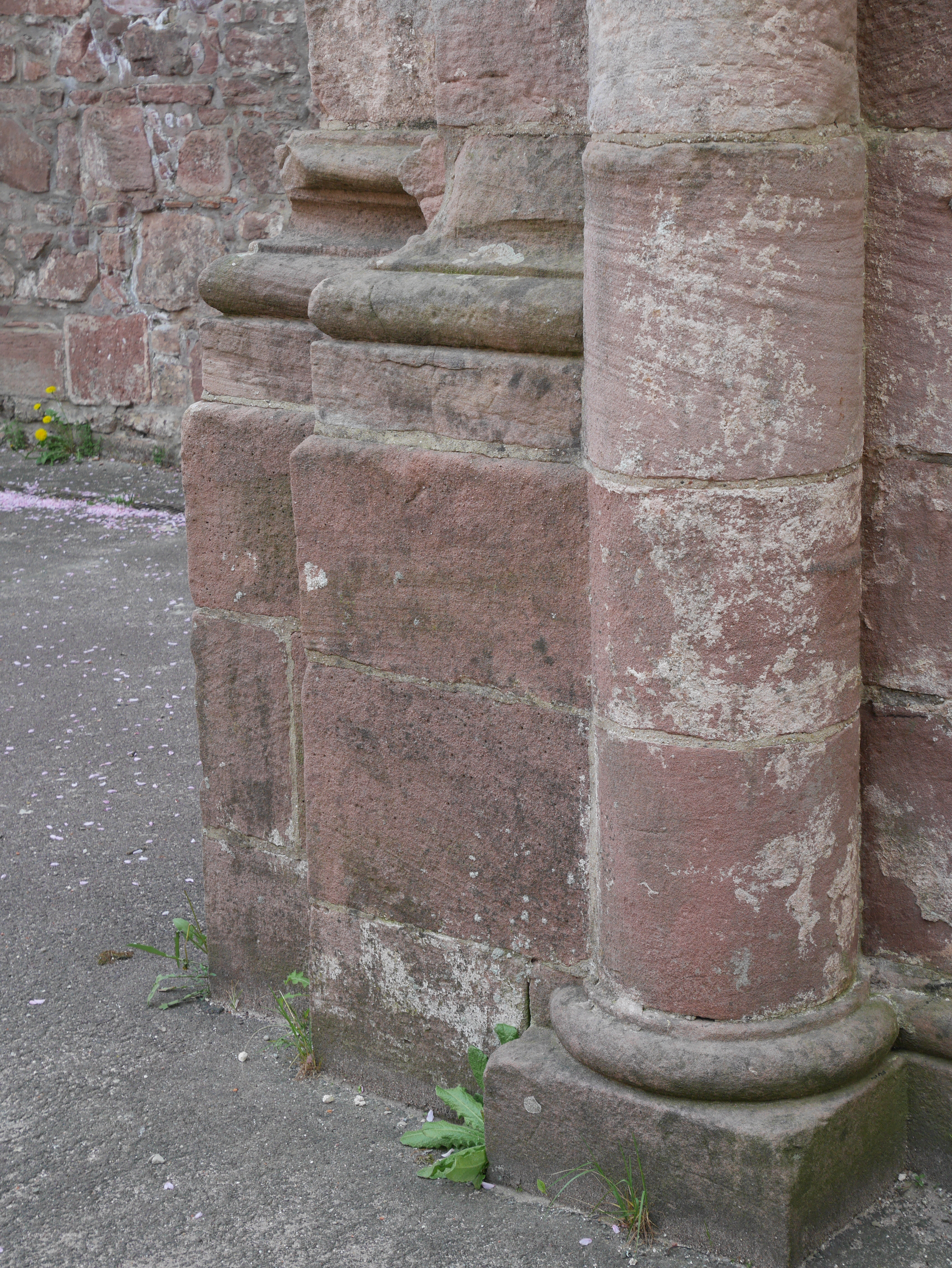 Frauenalb Abbey Säulenschaft